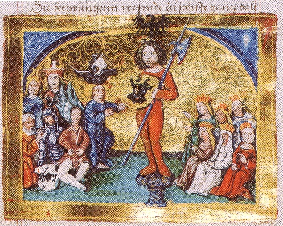 Folie 14. Radegast zu Mecklenburg und andere slawische Götter.